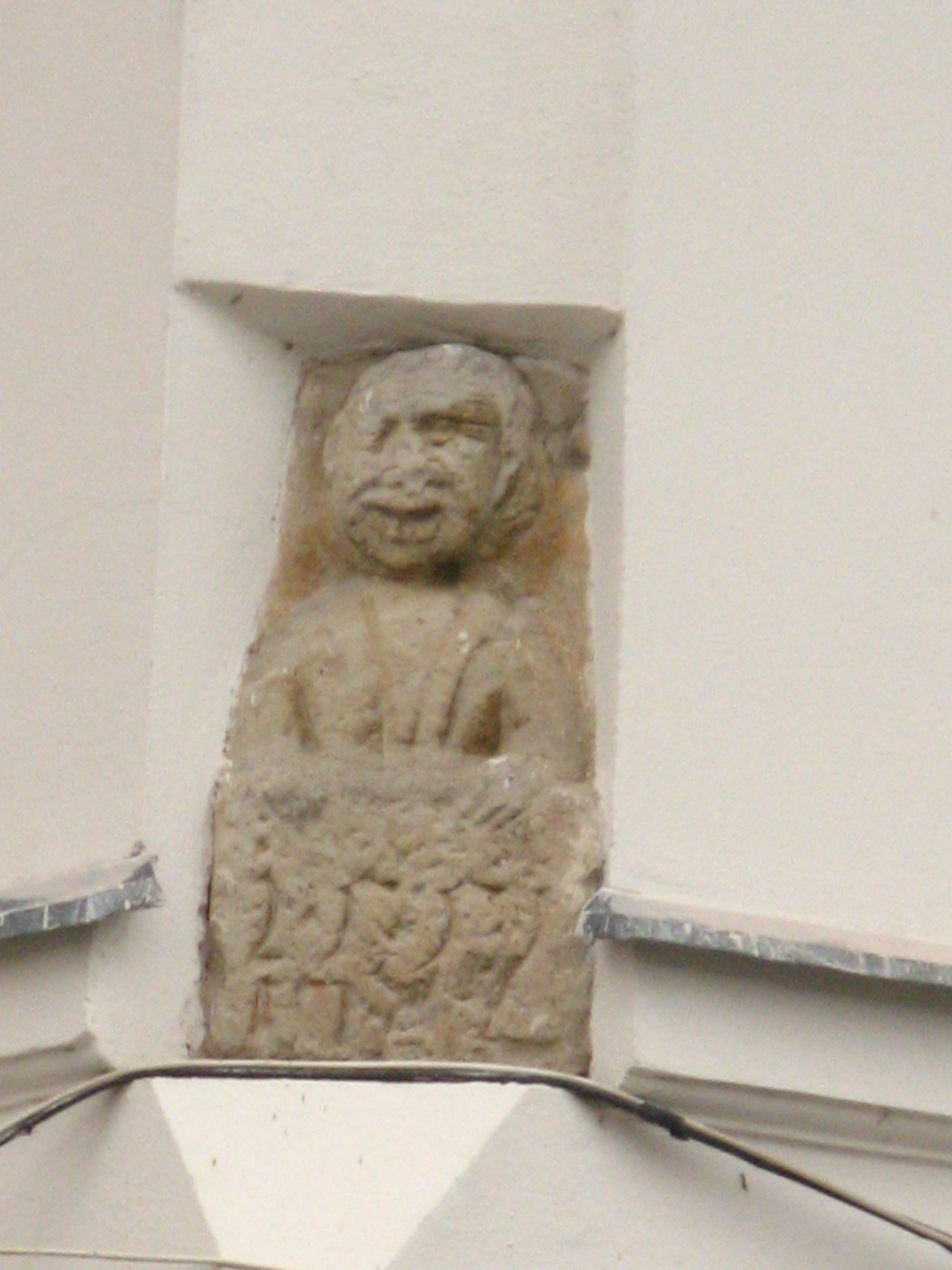 Dům U mouřenína na Náměstí míru ve Svitavách (detail - busta mouřenína na domě)